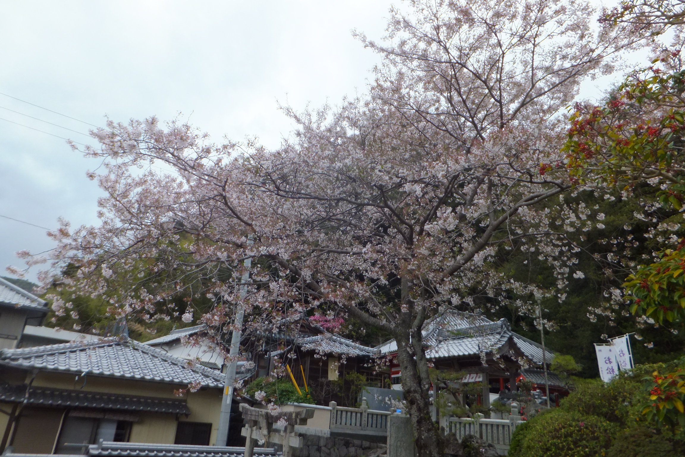 お松大権現 2014年4月4日